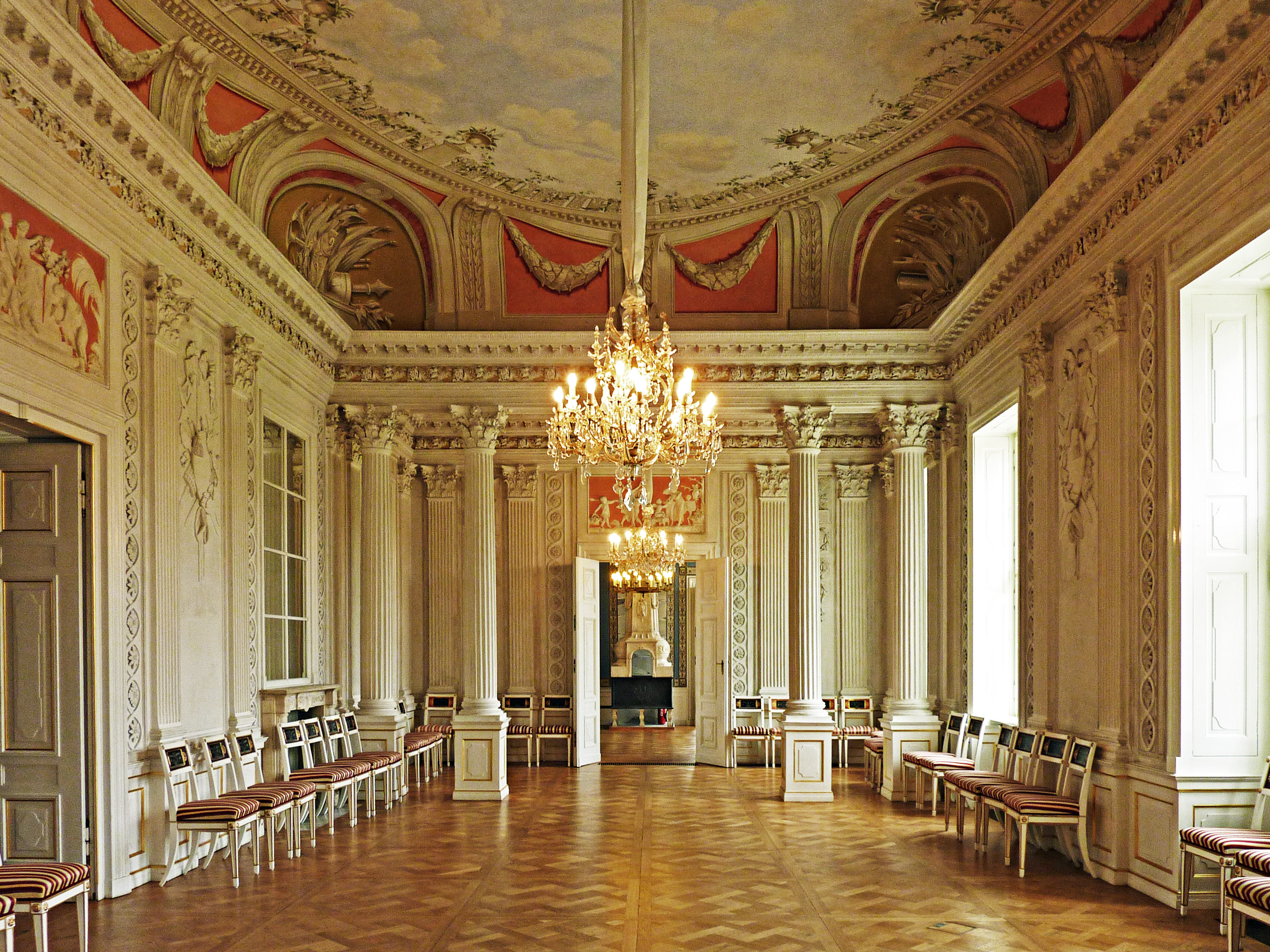 Frühklassizistischer Festsaal im Obergeschoss des Schlosses Friedrichsfelde. Sicht Richtung blaues Zimmer an der Westseite.